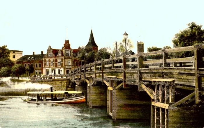 Puusild